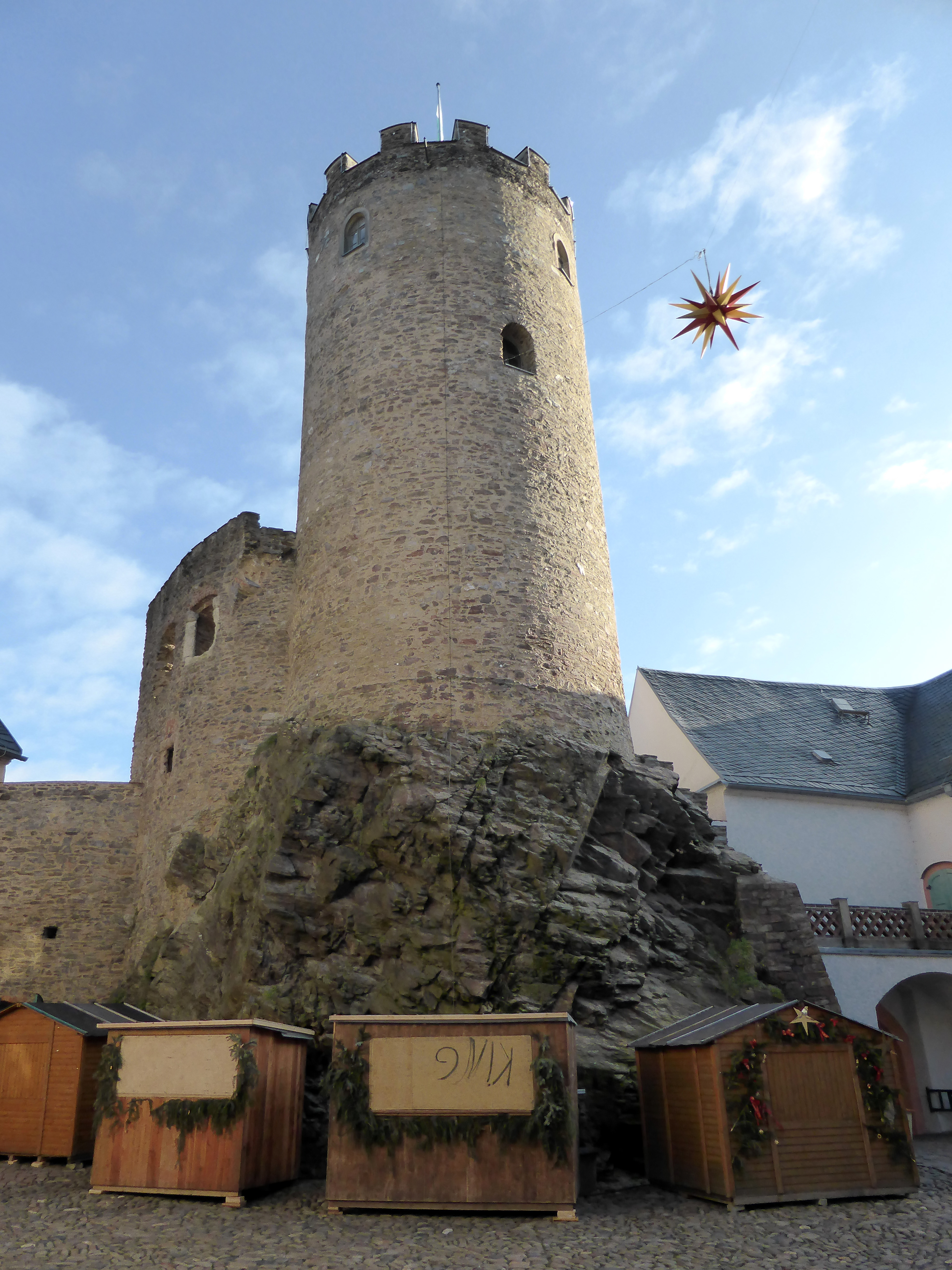 Burg Scharfenstein, Erzgebirgskreis - Sachsen.